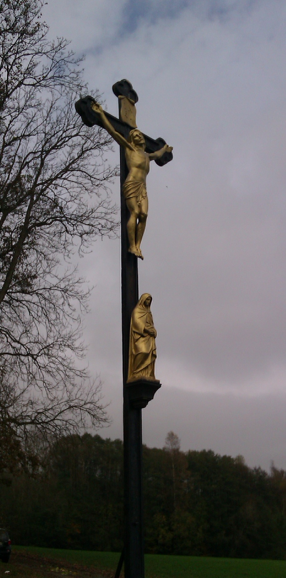 Großes gusseisernes Kreuz bei der Kapelle bei Peugenhammer